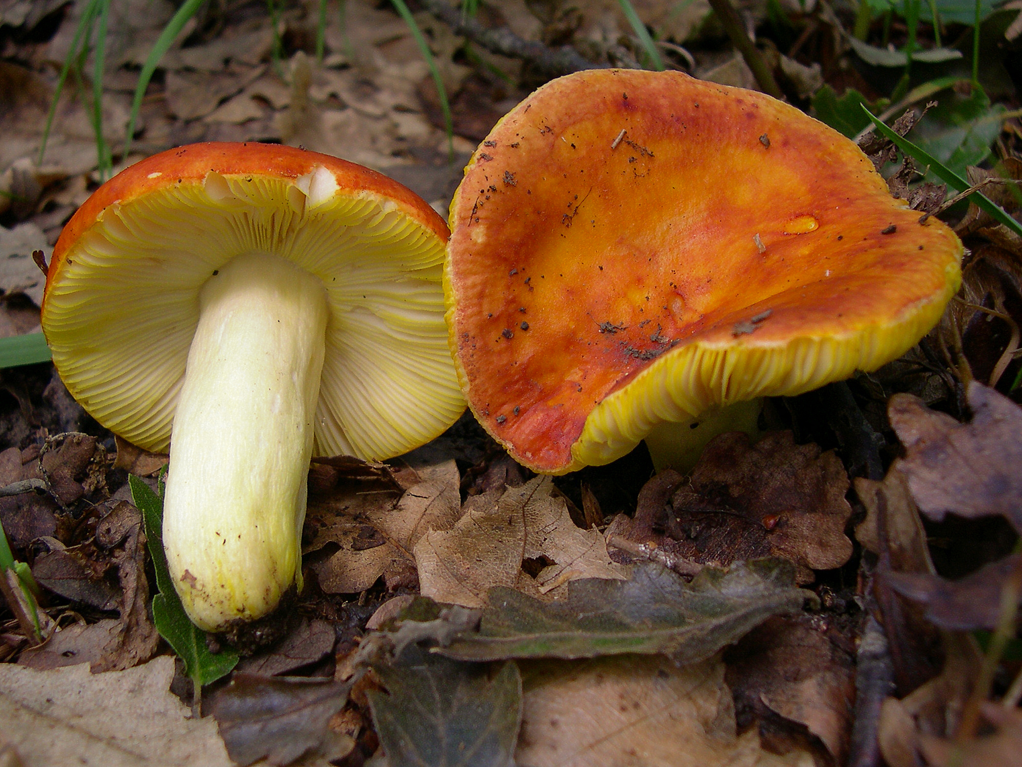 Russula aurea Pers.